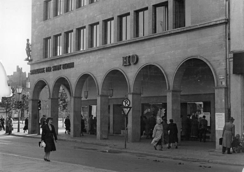 Berlin, Friedrichstraße, "Haus der Schweiz" Illus Köhler 8.10.1951 Berlin 1951. Blick auf das Haus der Schweiz. Unter den Linden Ecke Friedrichstraße.